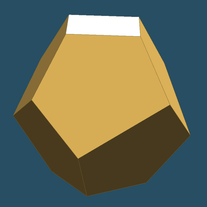 Schiefes Dekaeder – enstanden durch weiteres Beschneiden eines Abgeschrägten Hexaeders.